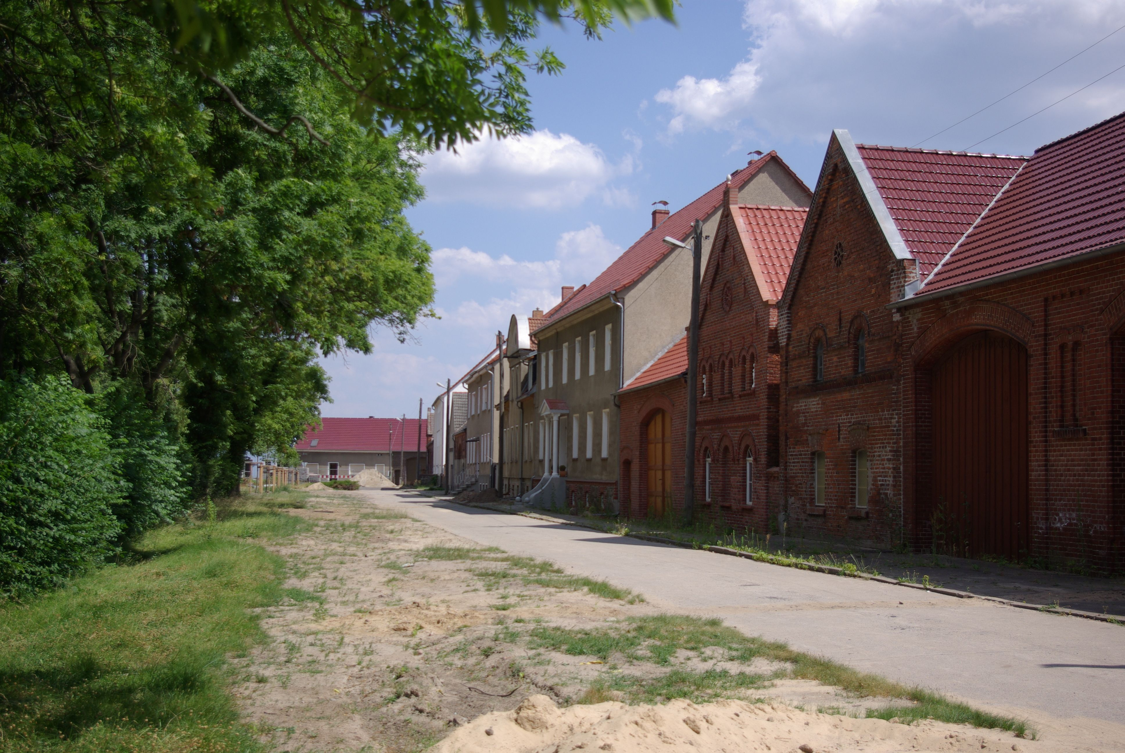 Jüterbog Ortsteil Grüna. Der Dorfanger des Stadtteils. Links liegt die Kirche.